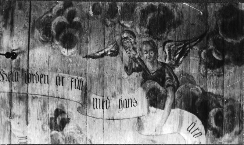 Fotografi av tak efter framtagning och konservering år 1929. Kategori: (03) Målningar på träFotografi av tak efter framtagning och konservering år 1929.